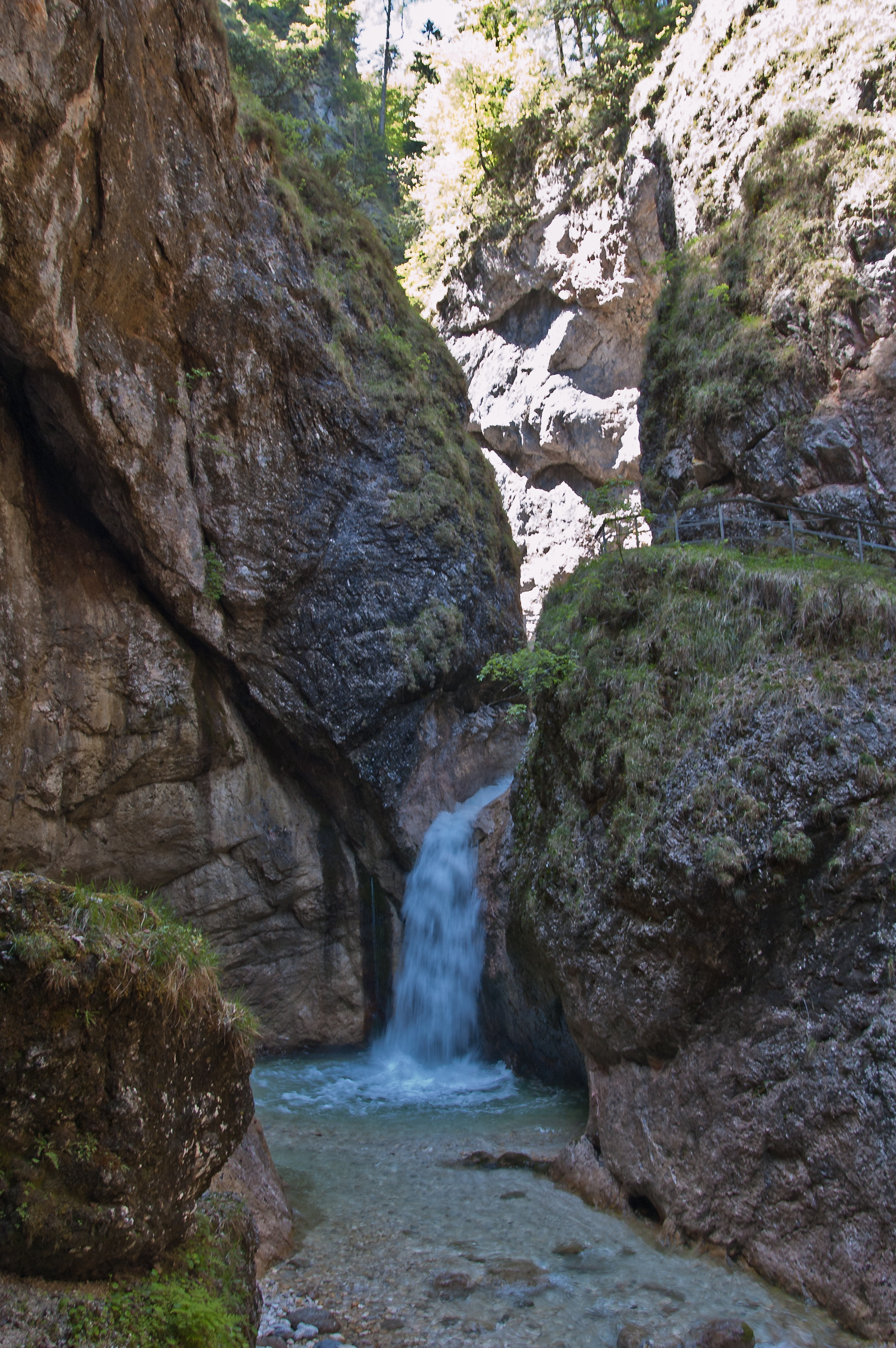 In der Almbachklamm